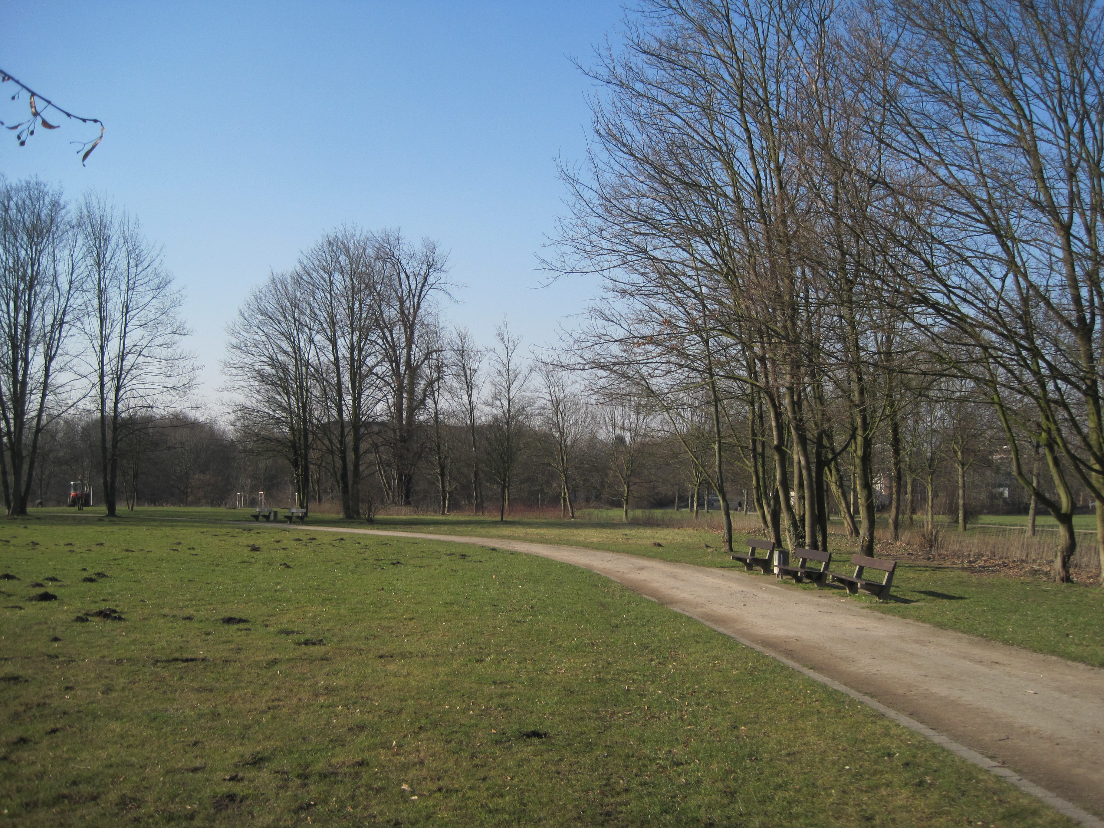 Das Foto zeigt das Gelände der Vorburg auf dem Burghügel Mark zu Hamm.